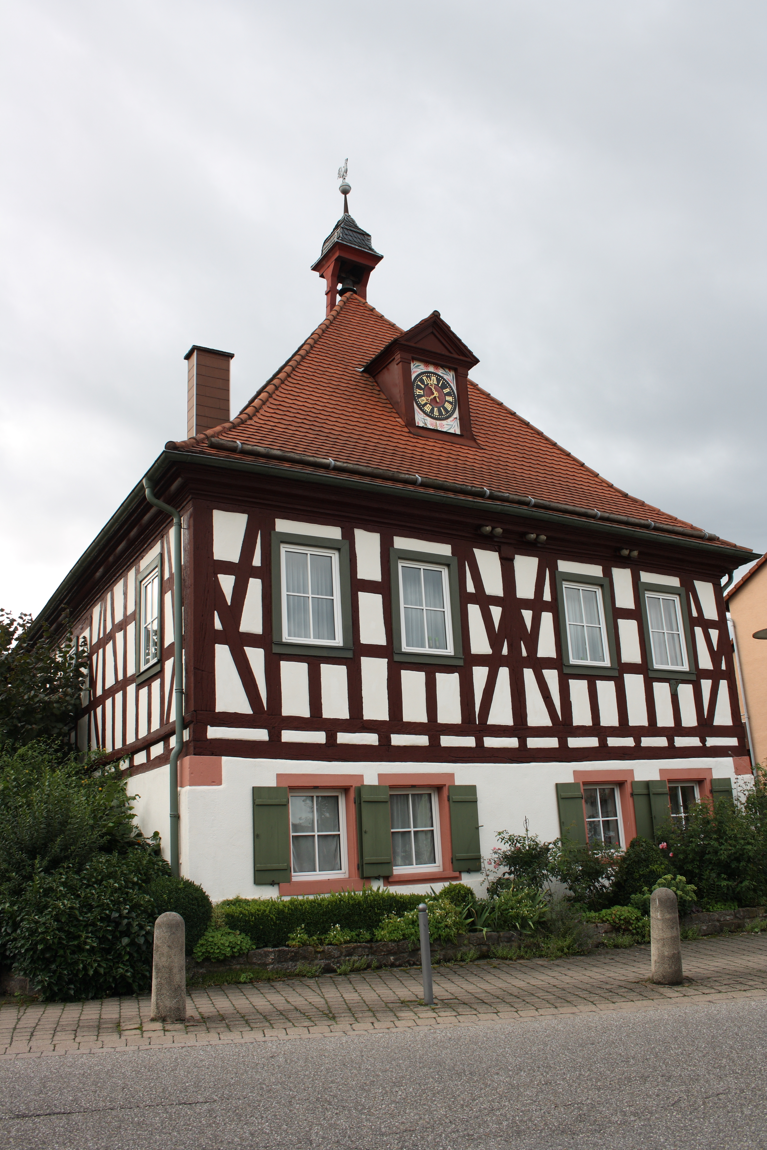 Altes Rathaus in Wössingen, Wössinger Straße 15